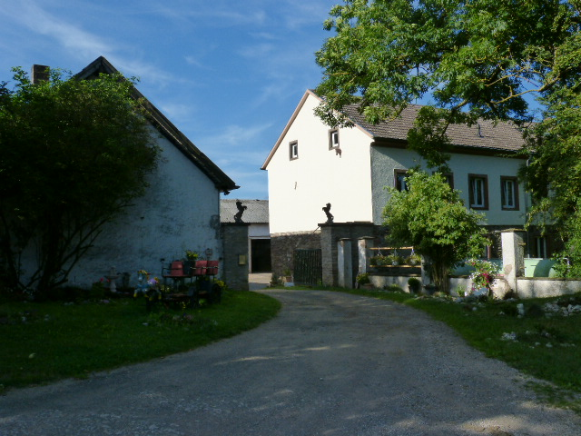 Zufahrt